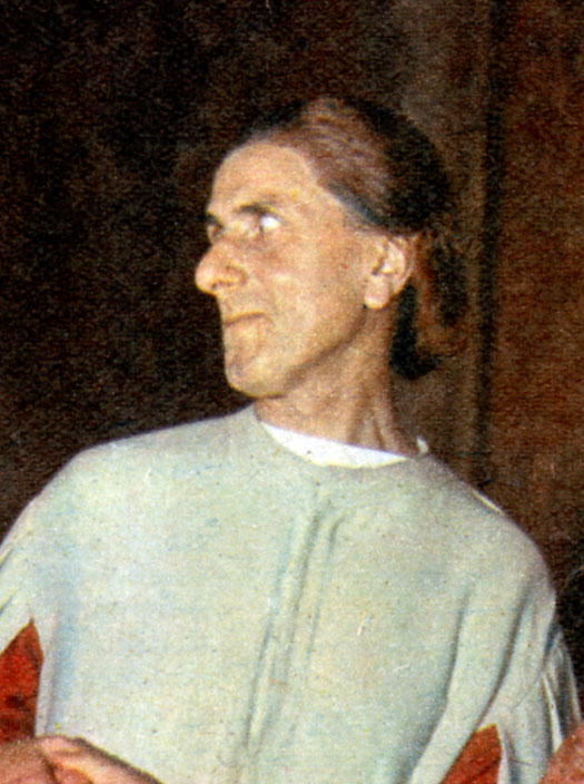 Mario Siletti attore